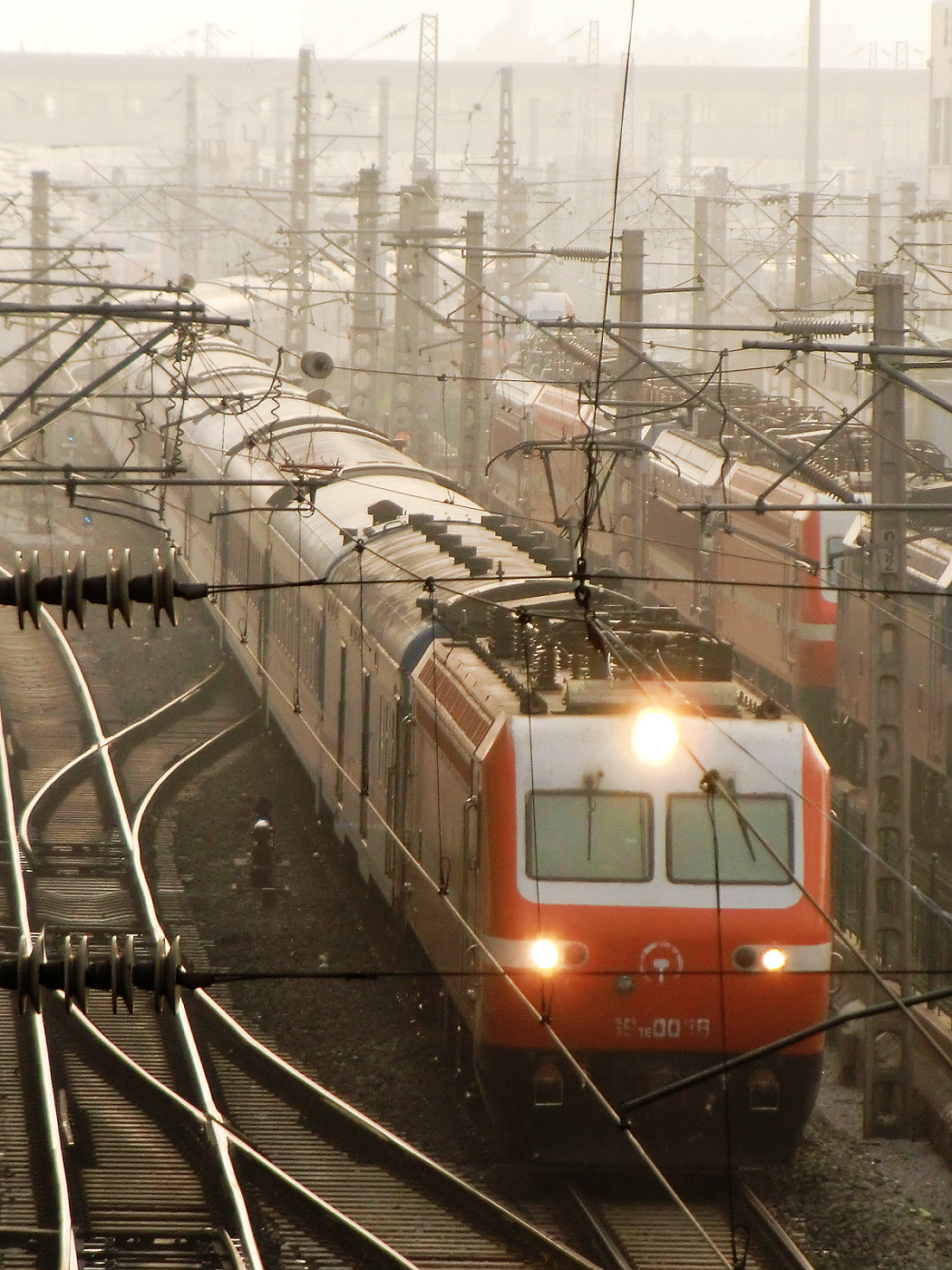 西安开往北京西方向的T42次列车刚离开西安站